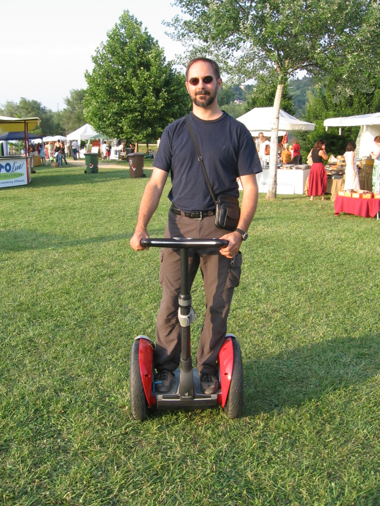 Autore: Jacopo Prisco Data: 24/06/2006 Categoria:Raduno di Vicenza 2006